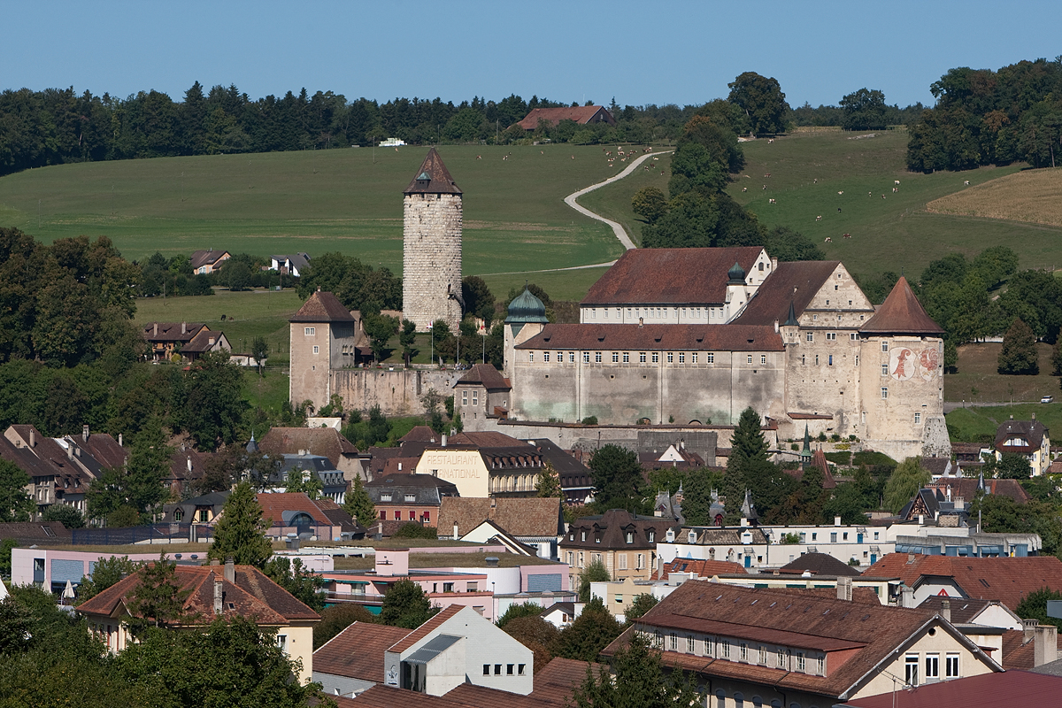 Schloss Pruntrut mit Tour Réfous